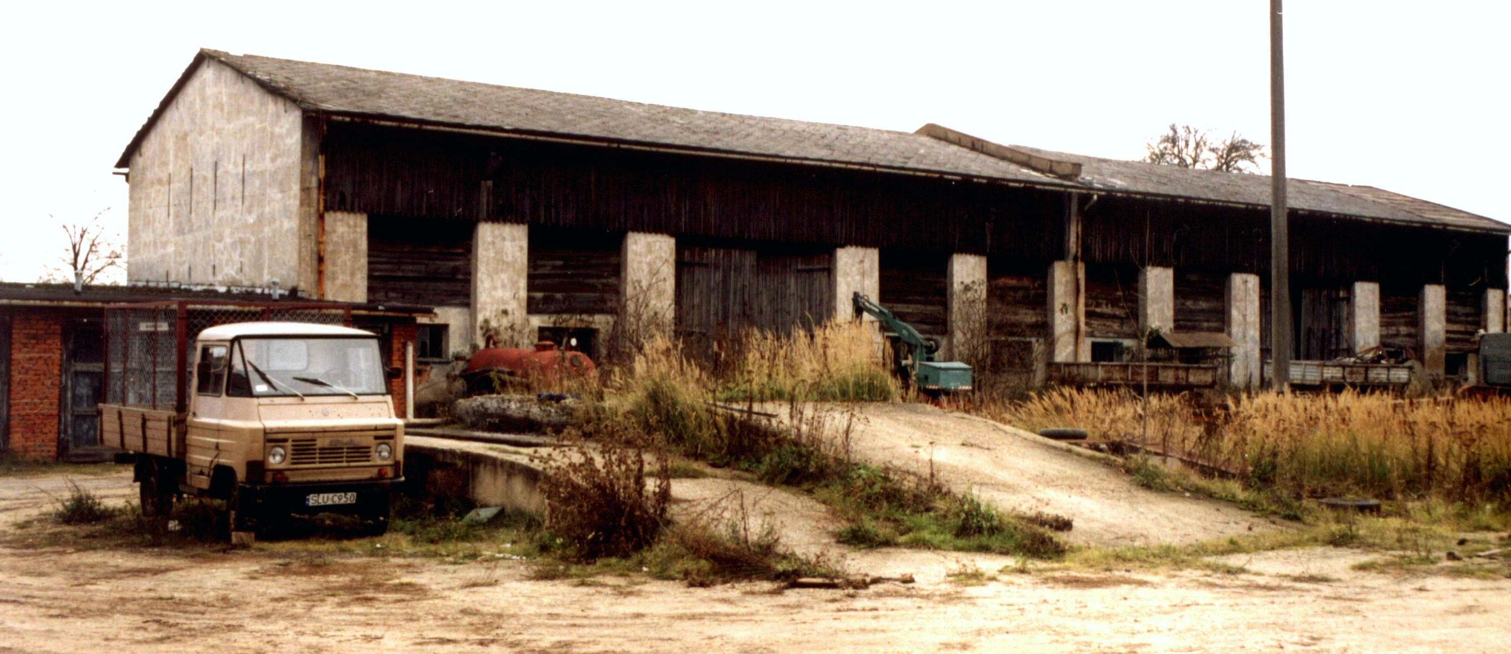 Fragment infrastruktury dawnej spółdzielni rolniczej w Boronowie